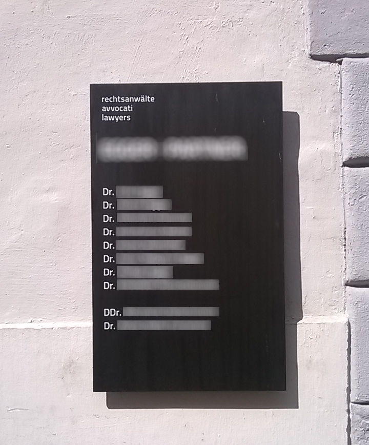 Schild einer Anwaltskanzlei in Bozen mit angeblich sage und schreibe zehn (10!) promovierten Doktoren der Rechtswissenschaft. Illustriert wird der in Südtirol übliche Usus, den italienischen Titel "dottore", den ausnahmslos jeder Akademiker zu tragen berechtigt ist, ins Deutsche mit "Doktor" oder "Dr." zu übersetzen, obwohl dieser Titel im deutschen Sprachraum allein für promovierte Akademiker reserviert ist. Dies geschieht unter Ausnutzung mangelnder rechtlicher Bestimmungen in Italien, in Österreich oder Deutschland hingegen werden derartige Titelanmaßungen mit empfindlichen Geldstrafen oder gar Freiheitsstrafen geahndet. Ein nicht promovierter "Doktor" wird in Südtirol scherzhaft "Brennerdoktor" genannt.